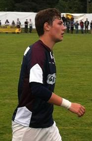 Damien Hempler im Servette-Dress